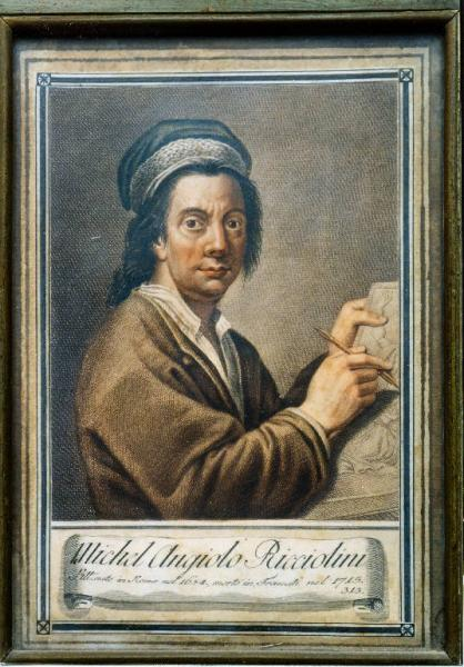 Self-portrait painter Michelangelo Ricciolini ( 1790 - circa 1796 )